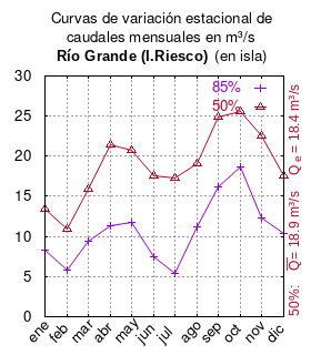 Curvas de variación estacional del río Grande de la isla Riesco. # # Estudio básico para desarrollar plan de riego en Región de Magallanes. Informe final. # Comisión Nacional de Riego # Ministerio de Agricultura # 2017 # url: # urlarchivo: # Tabla 4-7 Resultados de análisis de frecuencia de caudales medios mensuales (m3/s) seleccionados en la Región de Magallanes y Antártica Chilena, pág. 114 mes 85% 50% ene 8.36 13.43 feb 5.79 10.94 mar 9.45 15.94 abr 11.36 21.4 may 11.73 20.67 jun 7.51 17.57 jul 5.39 17.23 ago 11.22 19.14 sep 16.13 24.93 oct 18.64 25.58 nov 12.32 22.58 dic 10.39 17.56 This plot was created with Gnuplot.